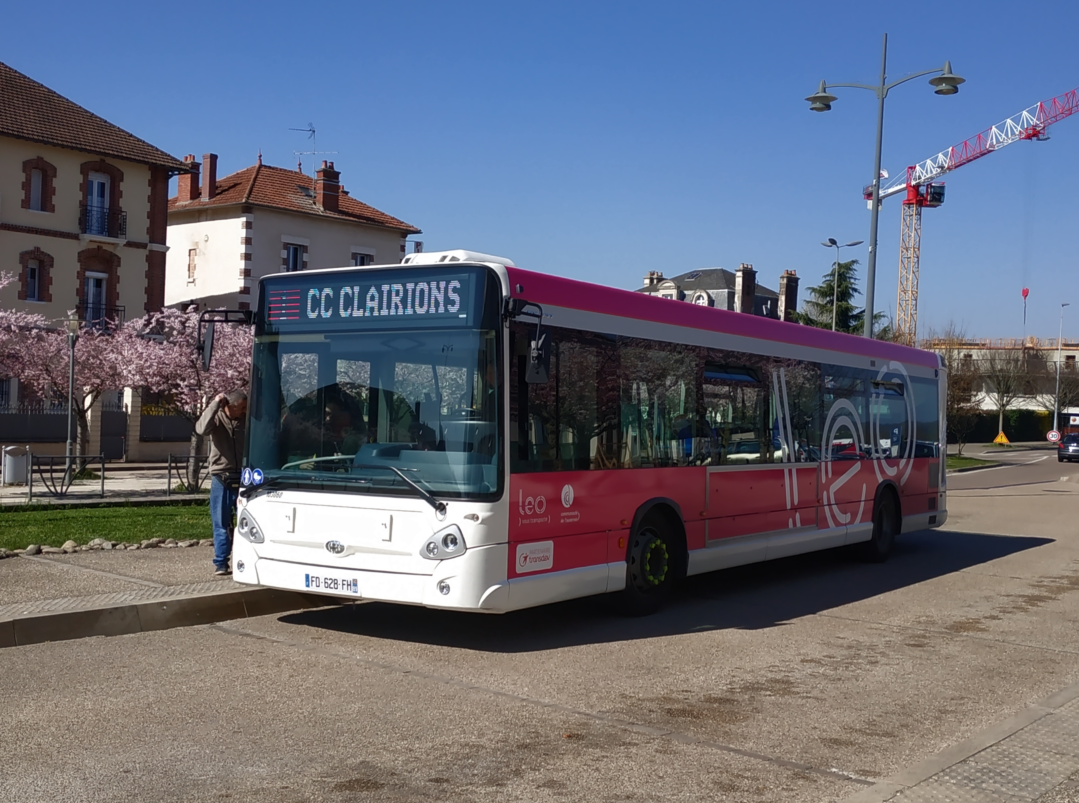 Autobus Leo à la gare d'Auxerre